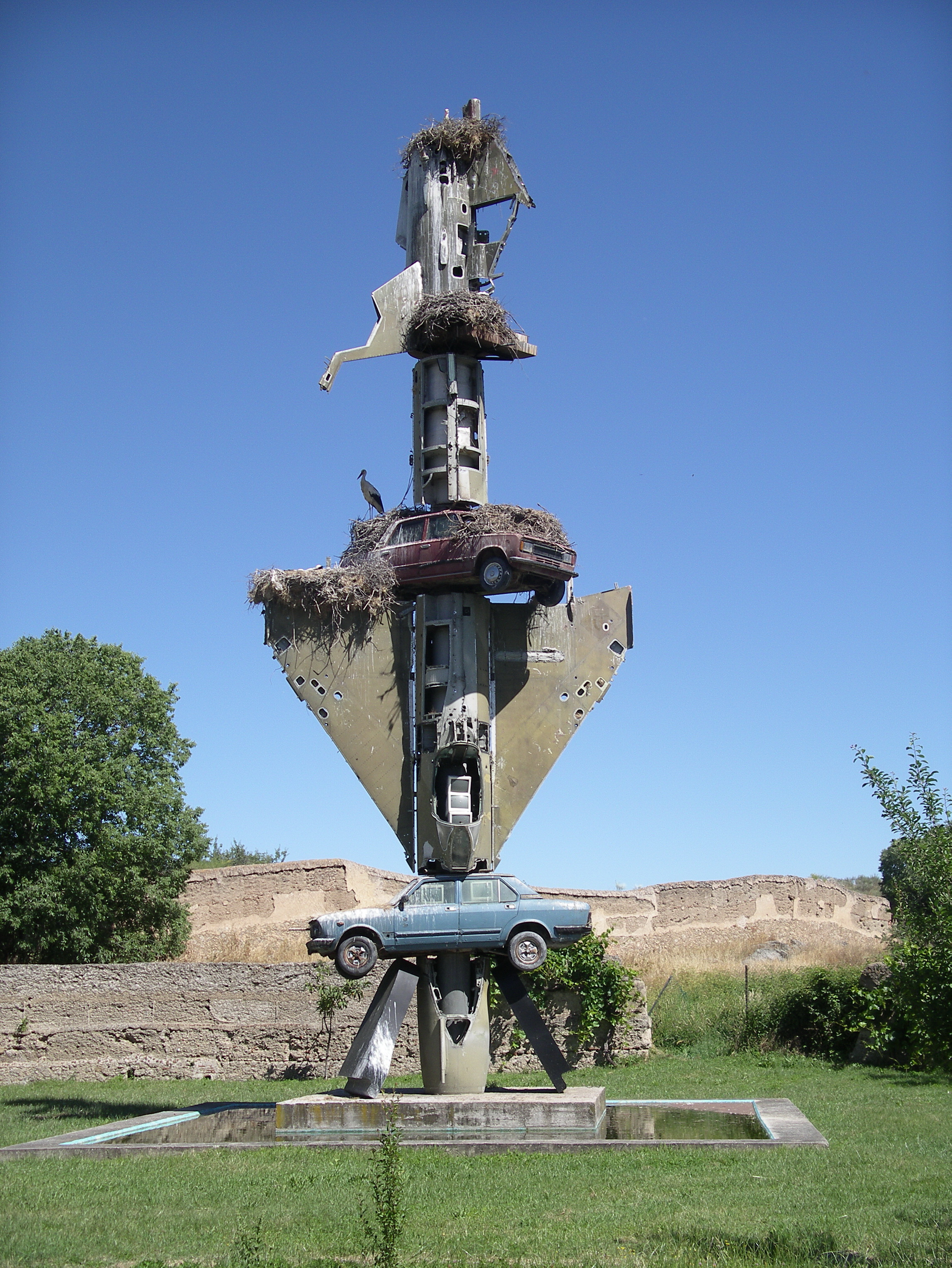 Lavadero de los Barruecos. Escultura de Wolf Vostell. Patio del Museo Vostell. Malpartida de Caceres